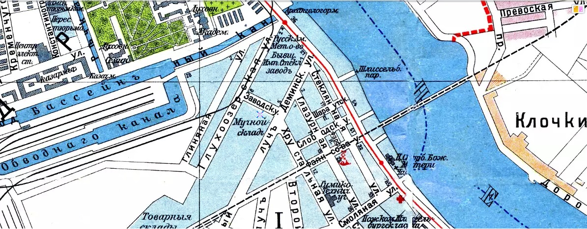 Финляндский мост на карте 1913 года